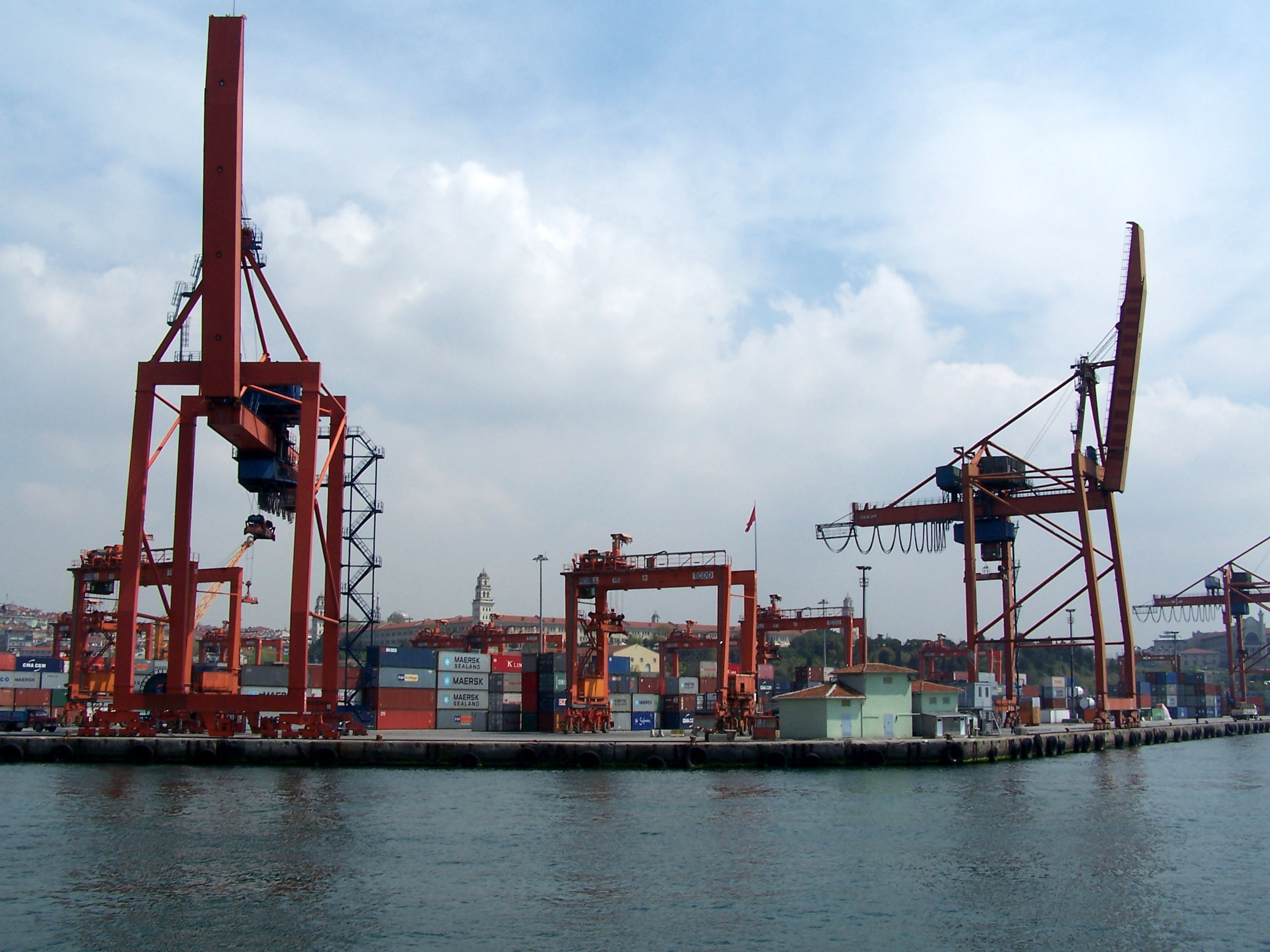 Haydarpaşa Limanı in Kadıköy, İstanbul, Turkey